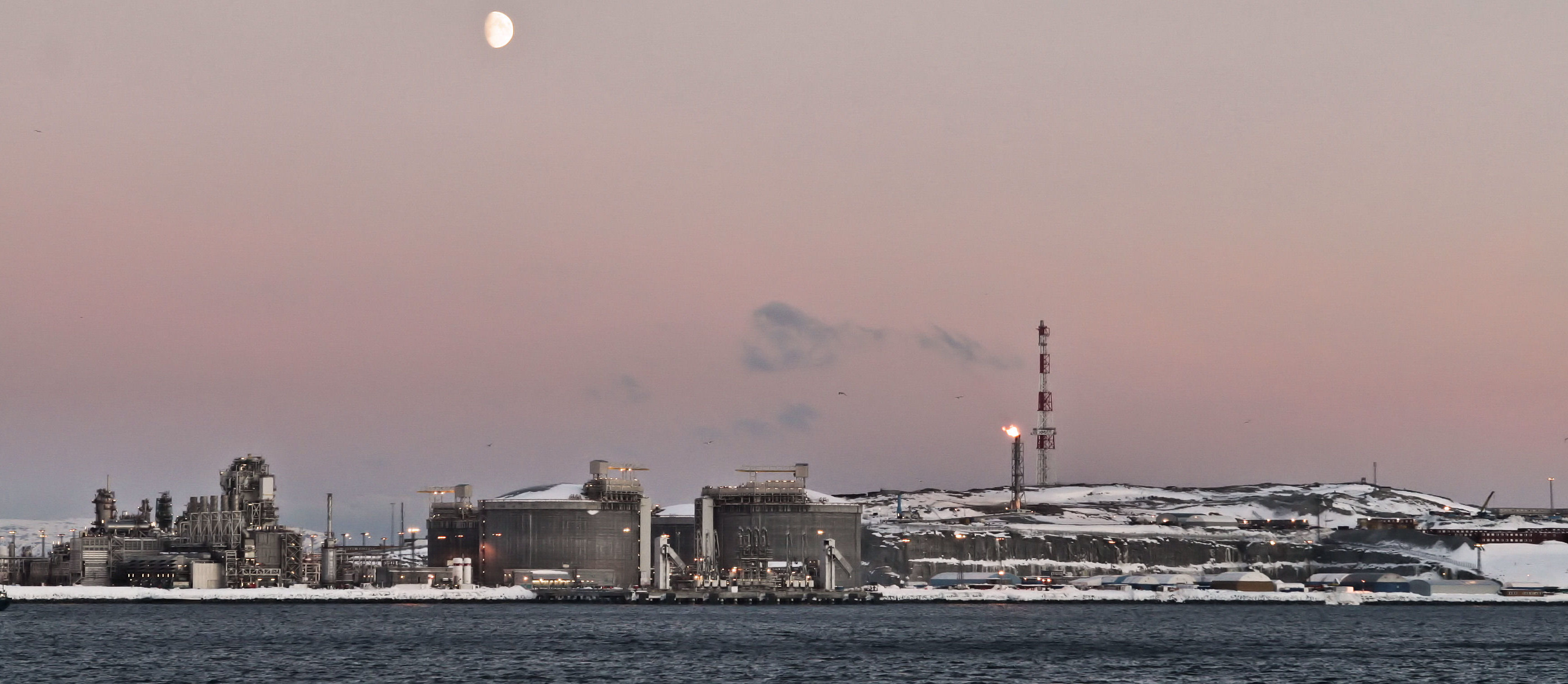 LNG gasterminal Melkøya, Hammerfest, Norway.Winter 2006-2007.